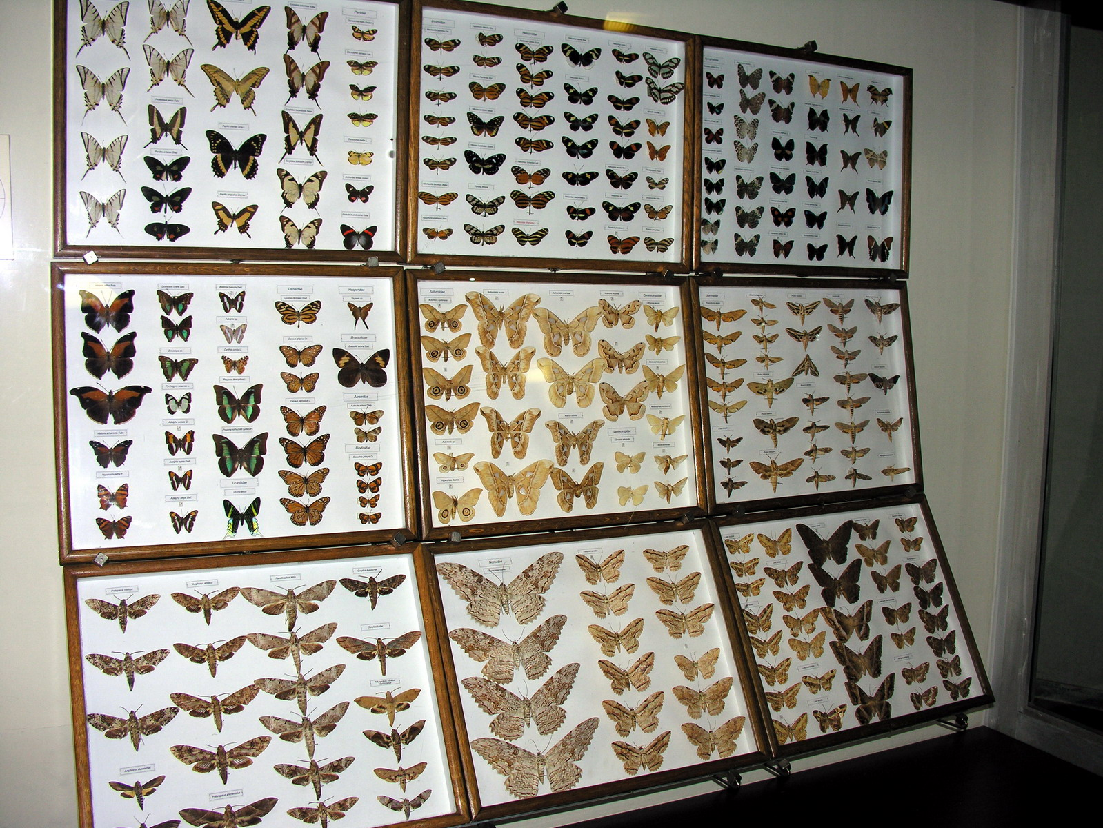 Tado Ivanausko zoologijos muziejus, Kaunas.